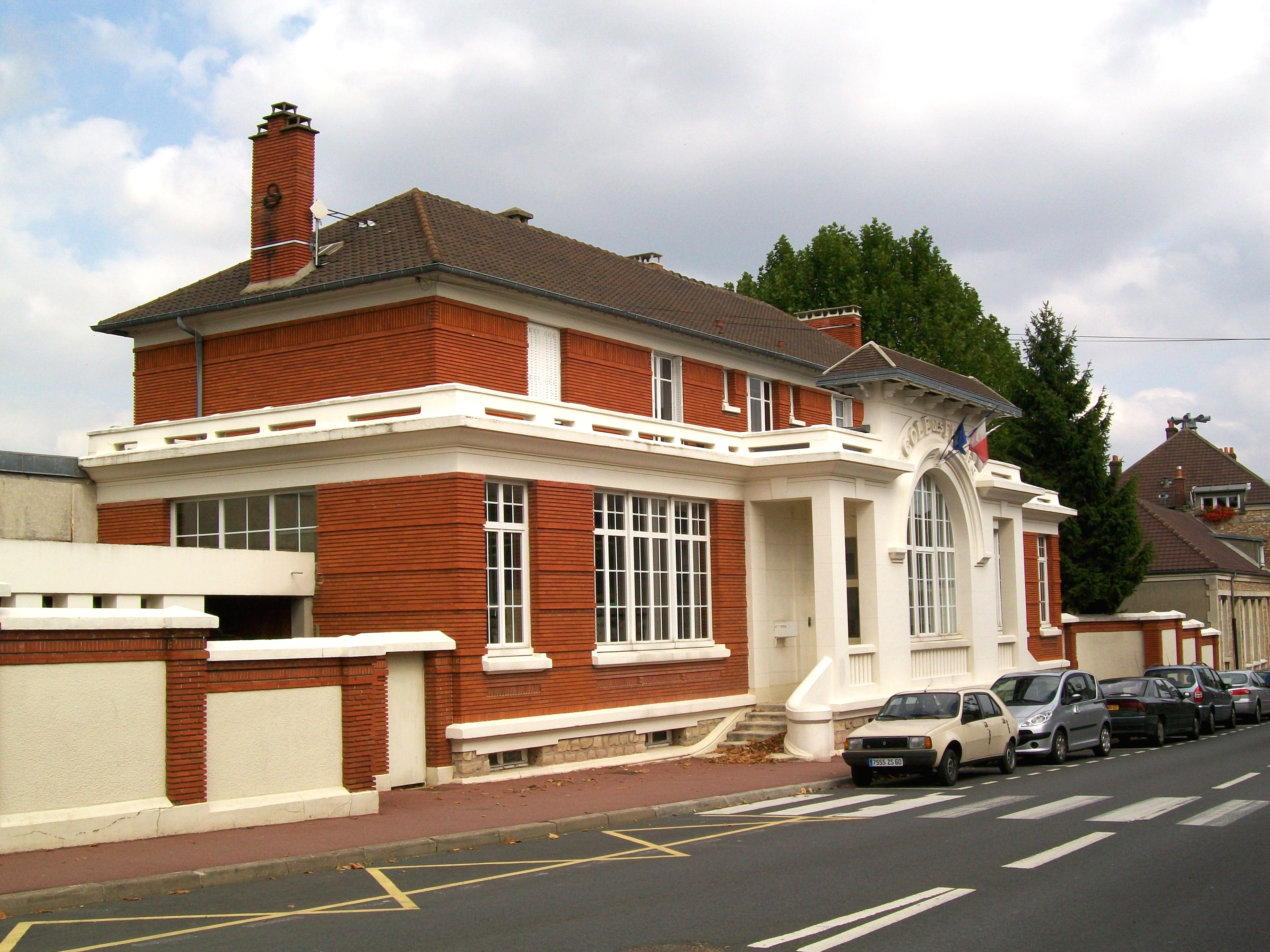 L'école des filles de Survilliers (95) datant de 1933-37, aujourd'hui intégrée dans l'école Romain-Rolland.